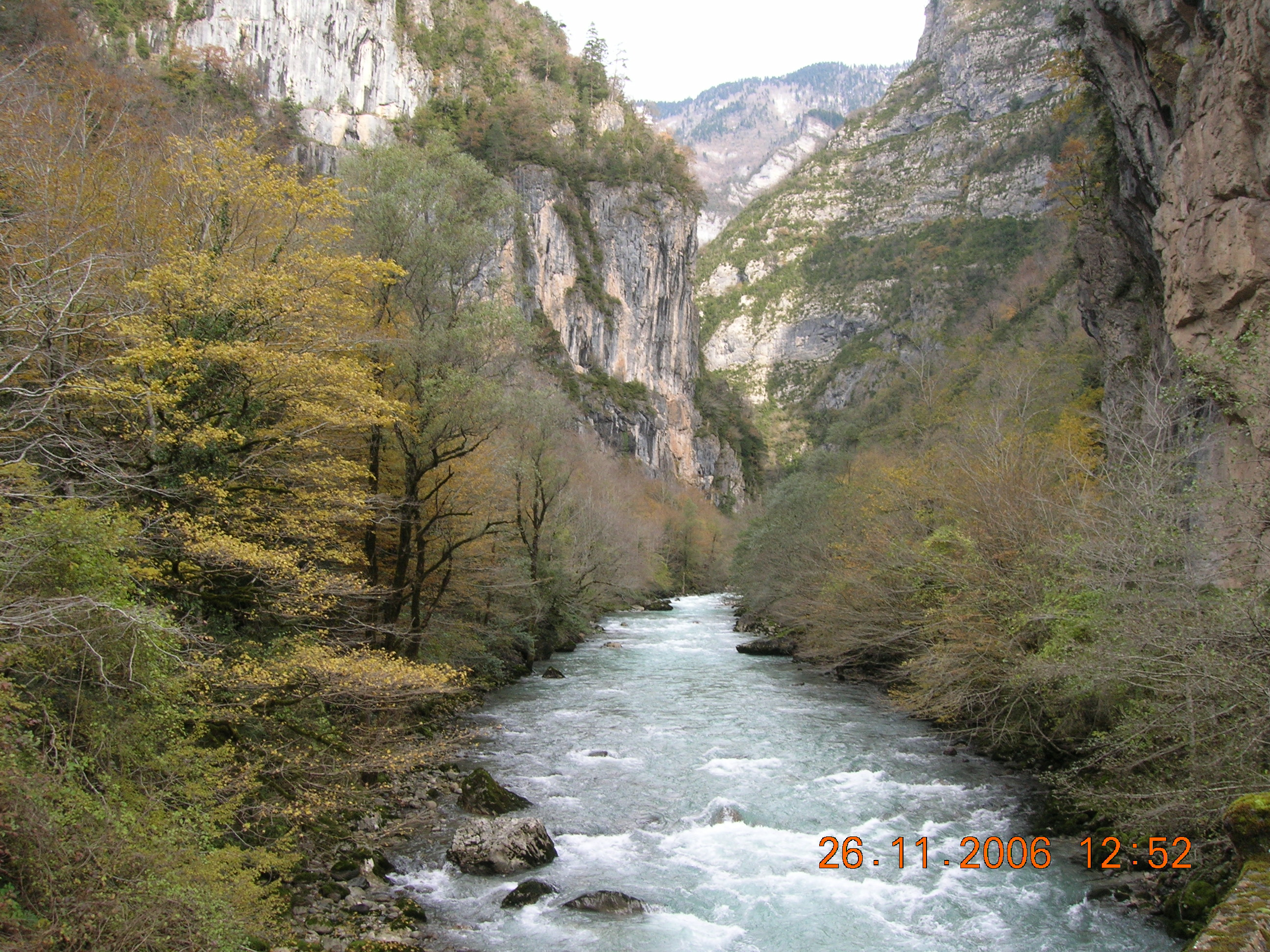 Bzyb river